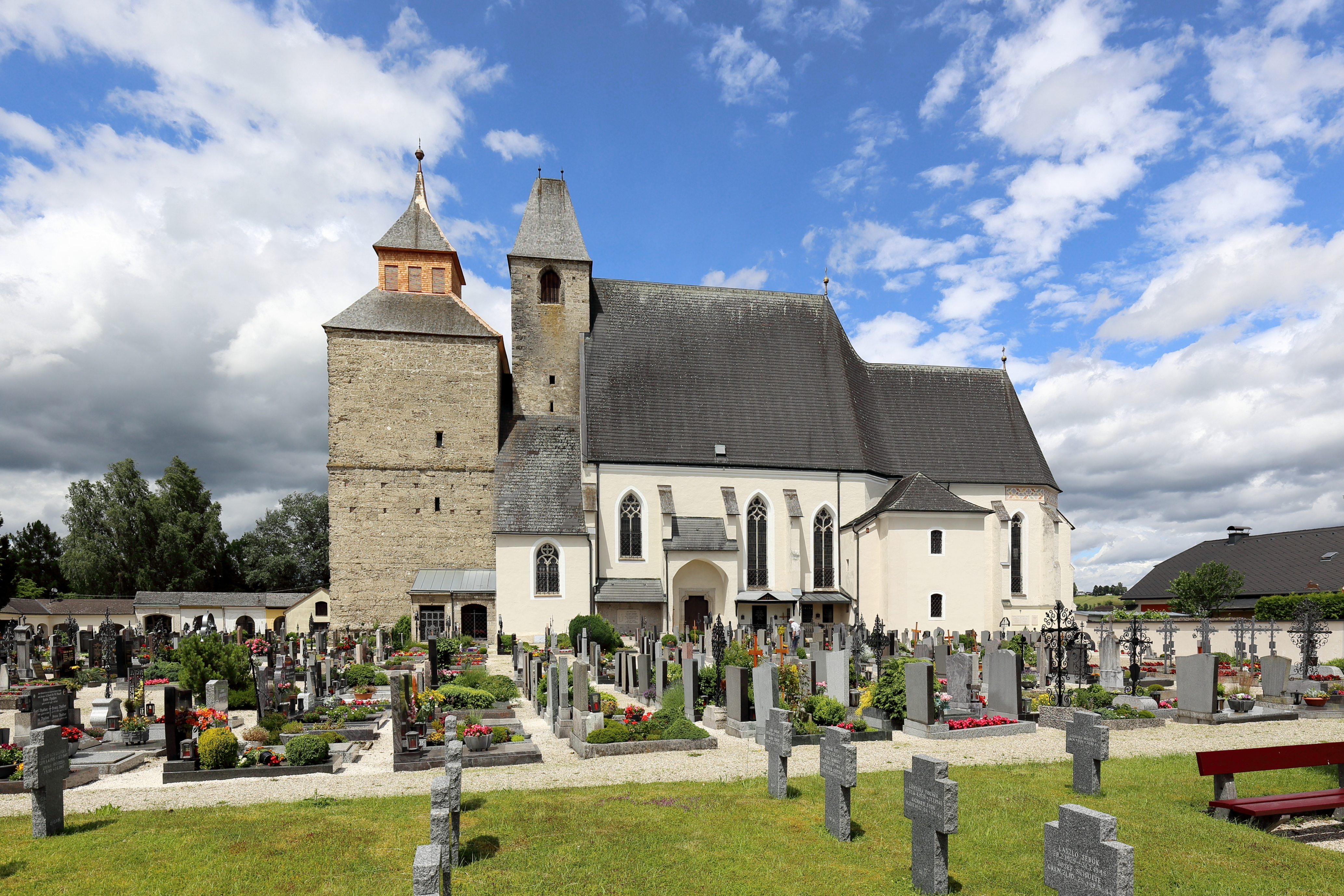 Südansicht der Schöndorfer Kirche in der oberösterreichischen Stadt Vöcklabruck.Die Kirche wurde auf einem Höhenplateau im ältesten Teil der Stadt errichtet und war bis 1785 auch Pfarrkirche der Stadt. Charakteristisch für dieses 824 erstmals urkundlich erwähnte Bauwerk sind die beiden ungleichen Türme.Der zweijochige gotische Chor, um 1400 errichtet, ist einschiffig und hat einen 5/8-Schluss. Das zweischiffige und vierjochige Langhaus wurde unter Einbeziehung älterer Bauteile von 1450 bis 1476 gebaut. Zu Beginn des 16. Jahrhunderts wurde der mächtige Westturm, der nie seine vorgesehene Höhe erreichte, angebaut. Der schmächtigere Turm sollte geschleift und die dadurch entstandene Lücke mittels Verlängerung des Langhauses zum mächtigen Westturm geschlossen warden.